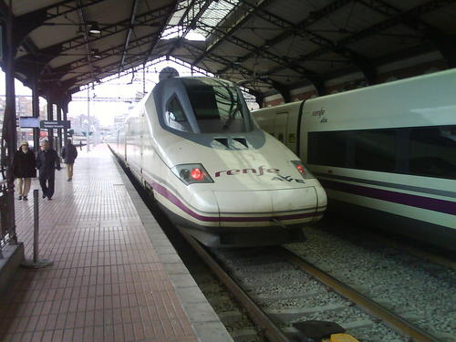 Ave S-102 estacionado en la Estacion Campo Grance de Valladolid